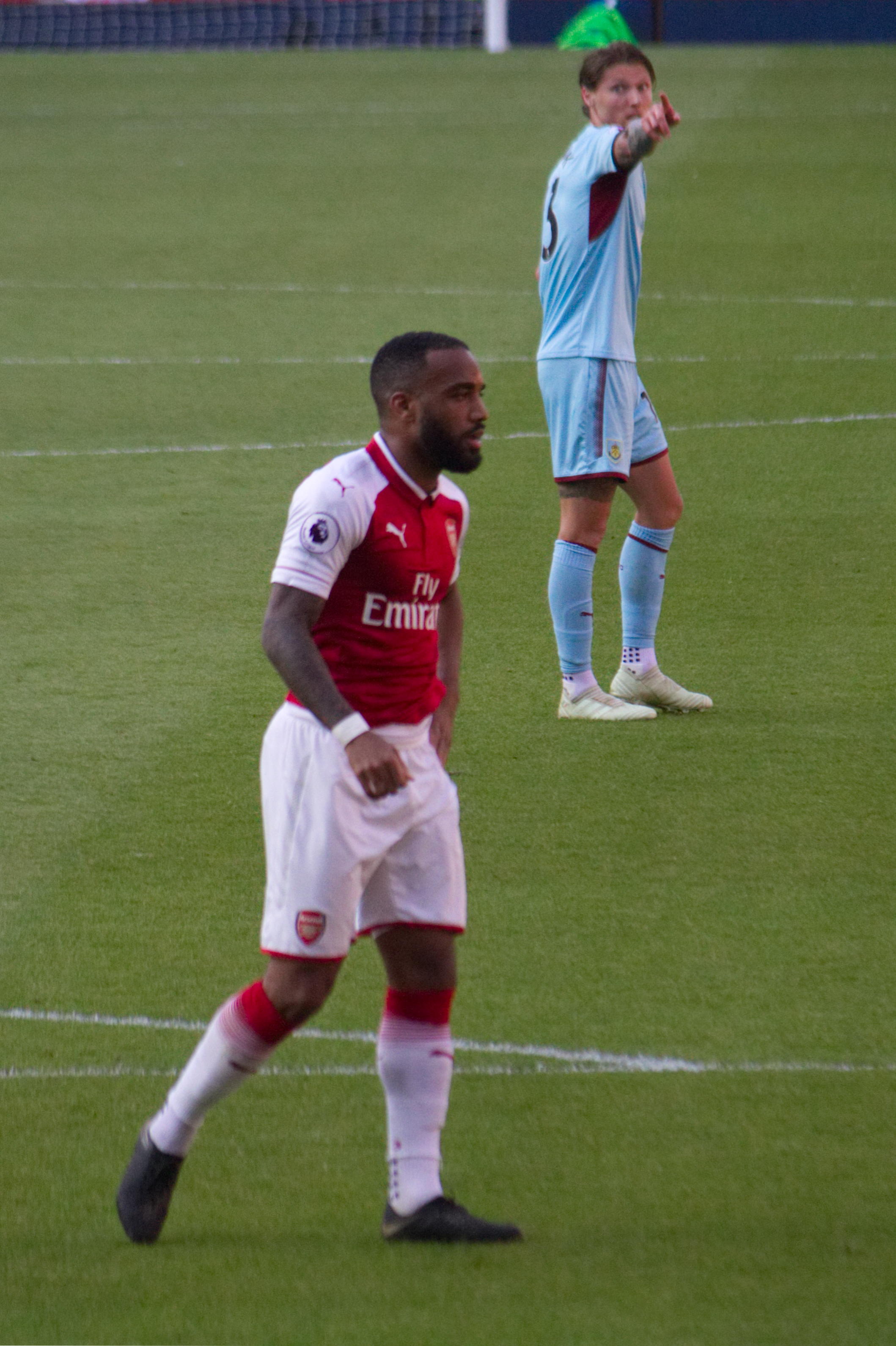 23 Merci Arsène - Lacazette